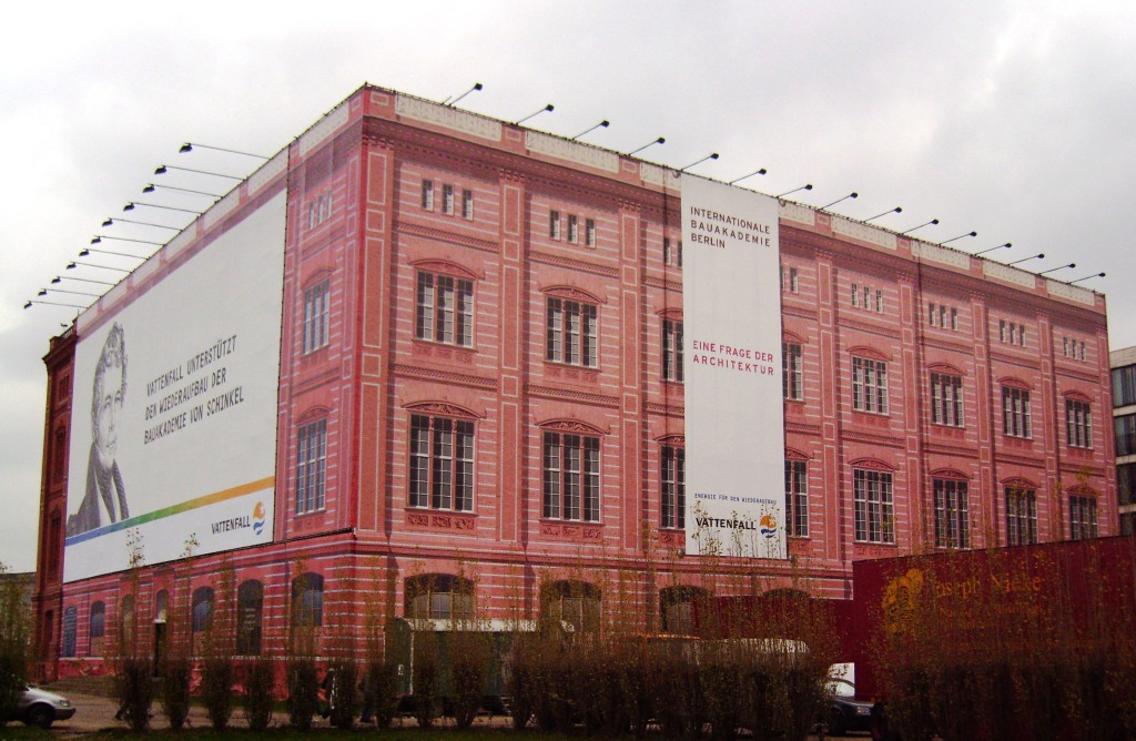 Blick auf die 2004 rekonstruierte Ansicht der Bauakademie im Sommer 2009